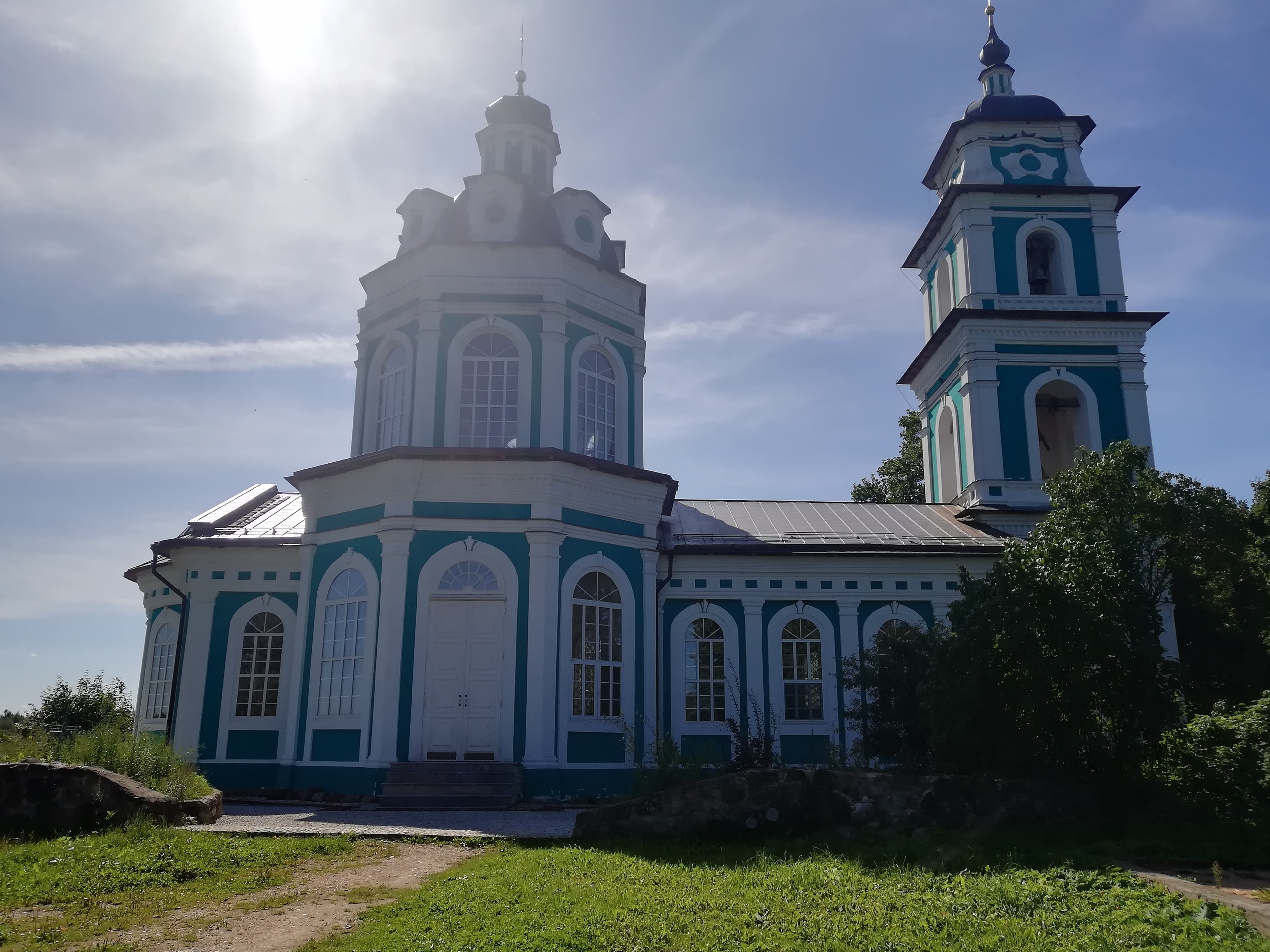 Церковь Успения Богородицы в д. Столбушино Новоржевского района Псковской области